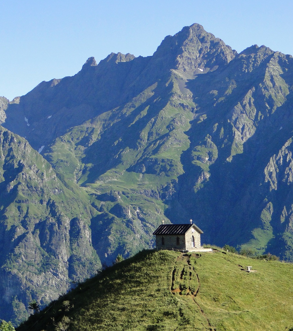 Passo della Manina con Pizzo Coca, Prealpi Orobie, Bergamo - CROPPED